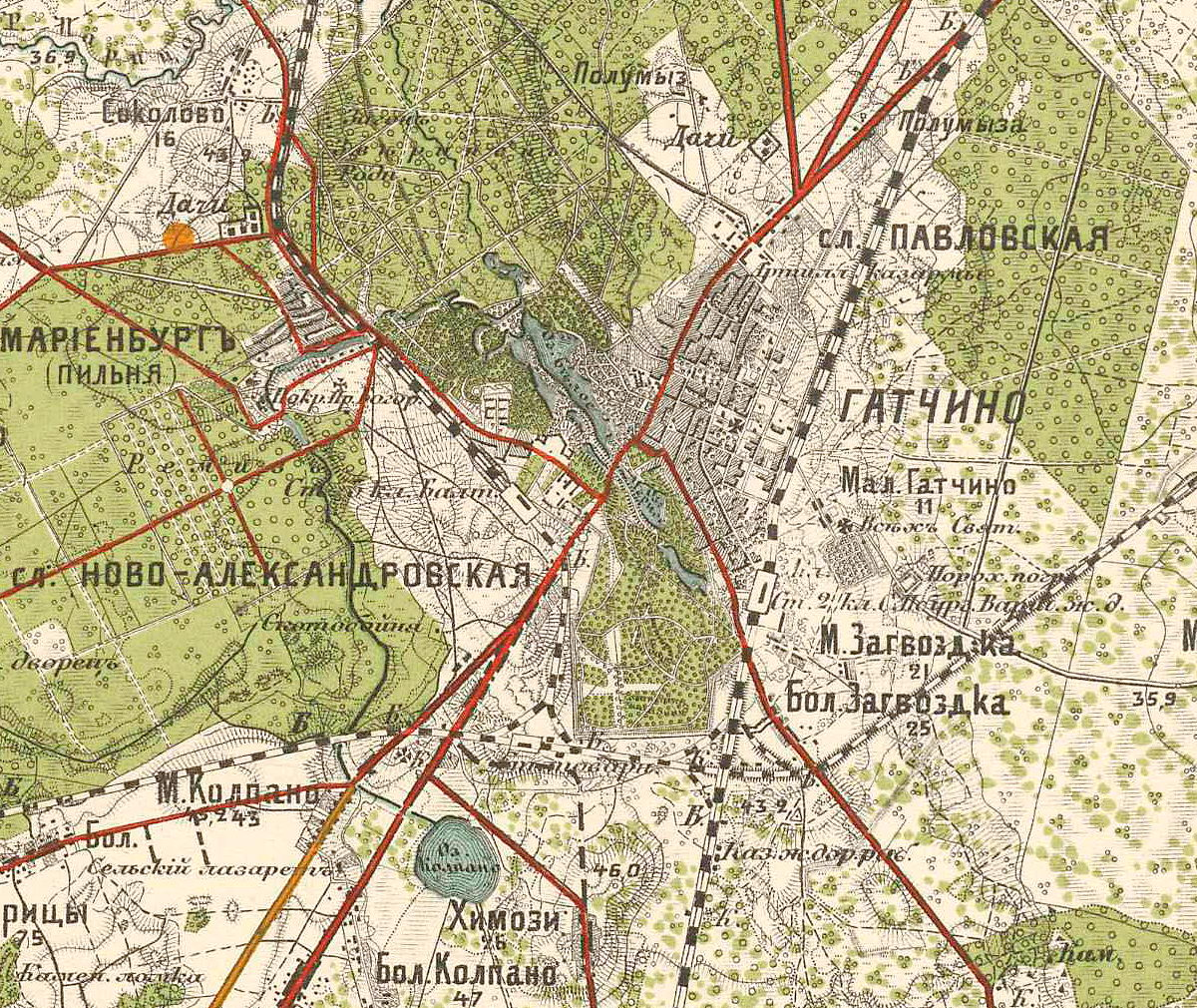 Гатчино на «Карте района манёвров 1913 года»